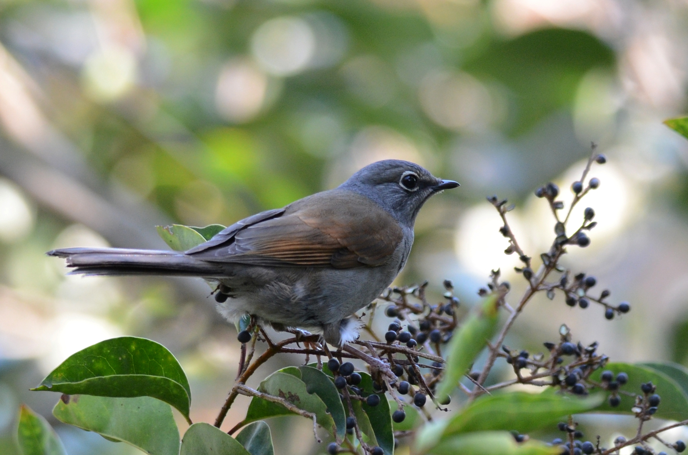 Huauchinango, Puebla, México